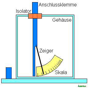 Aufbau eines Elektroskops, GFDL gezeichnet von Honina